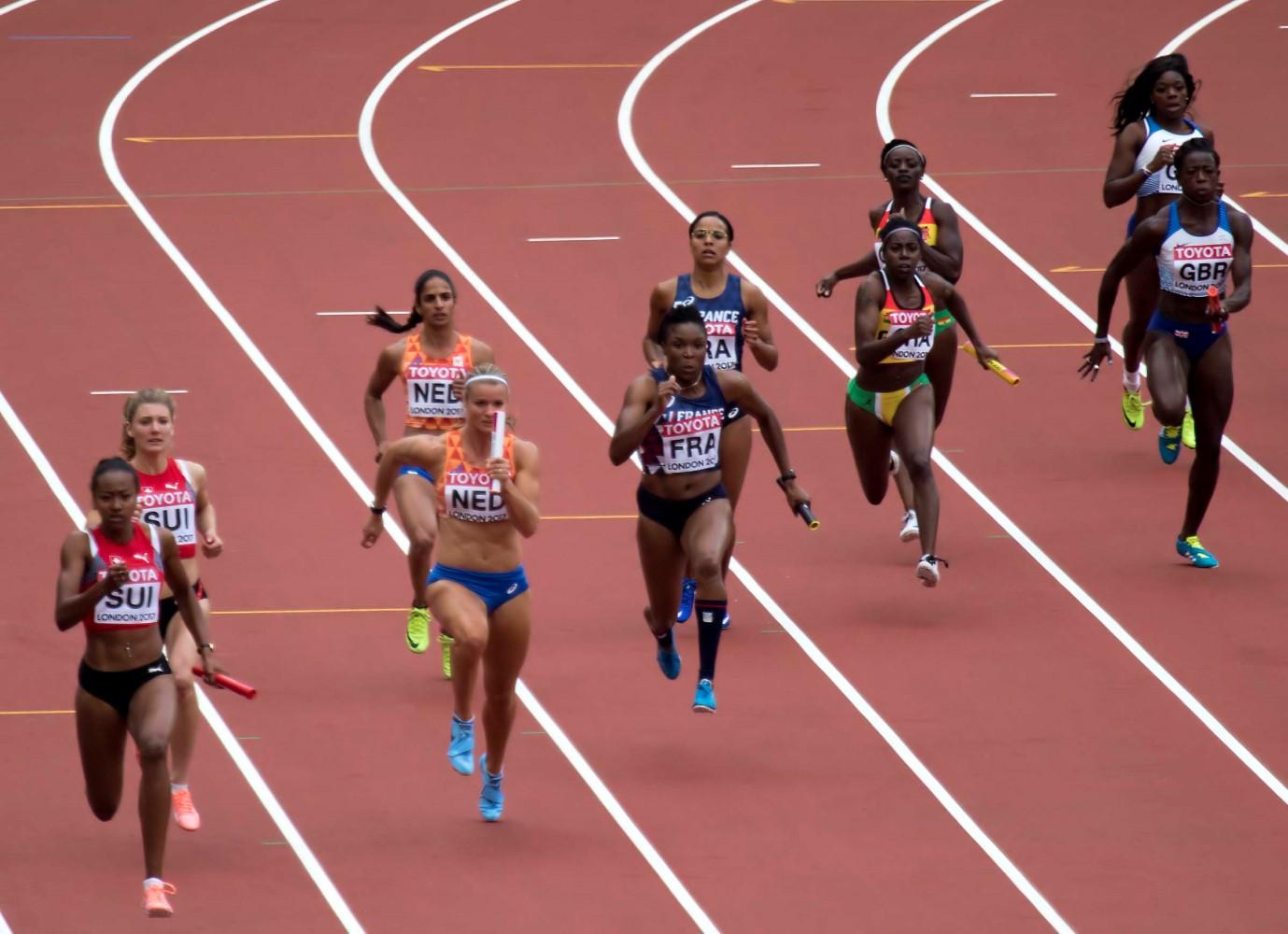 d8_3 4x100m reeksen dames